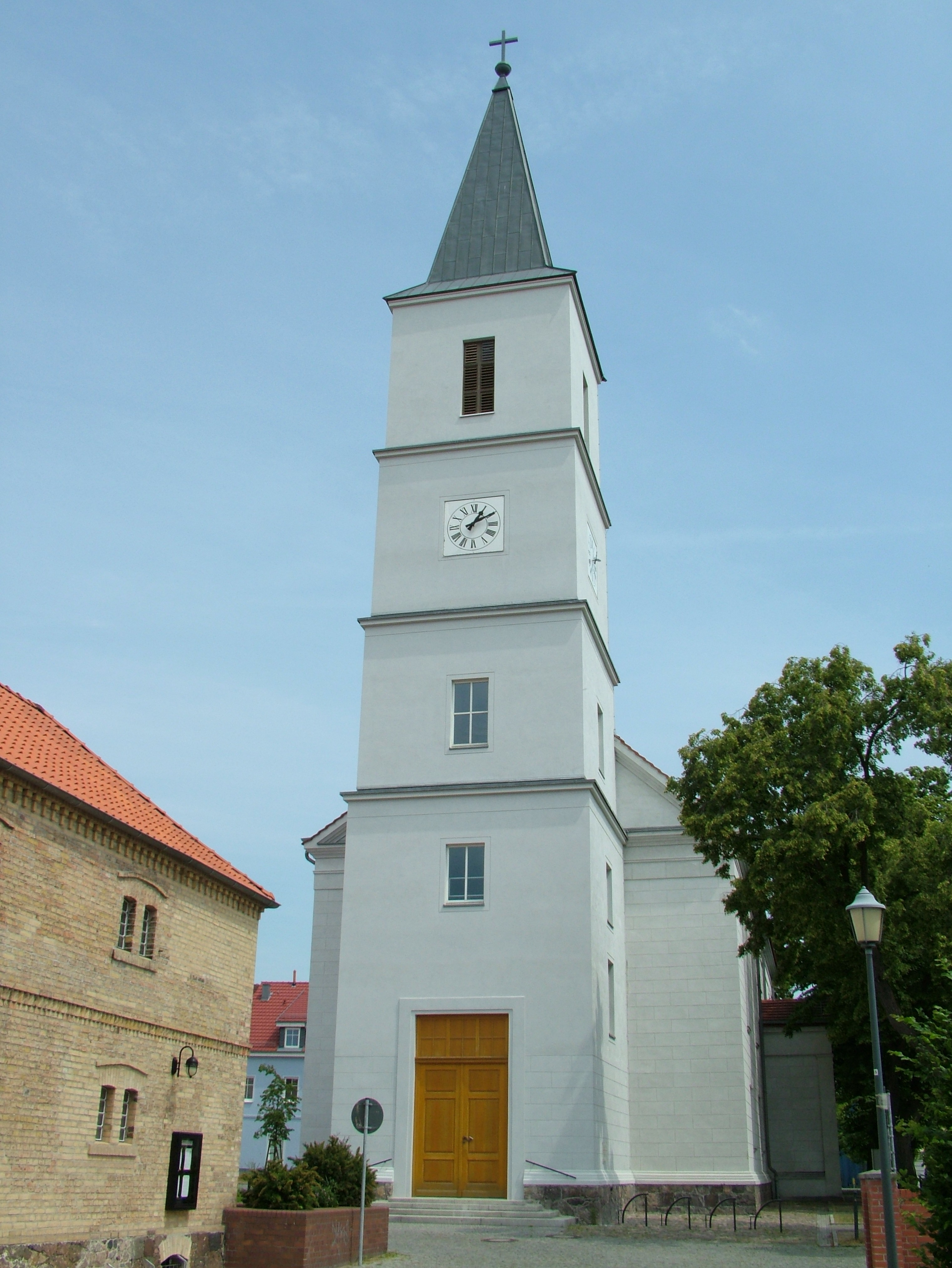 Seelow, Brandenburg, die Kirche in der Ortsmitte